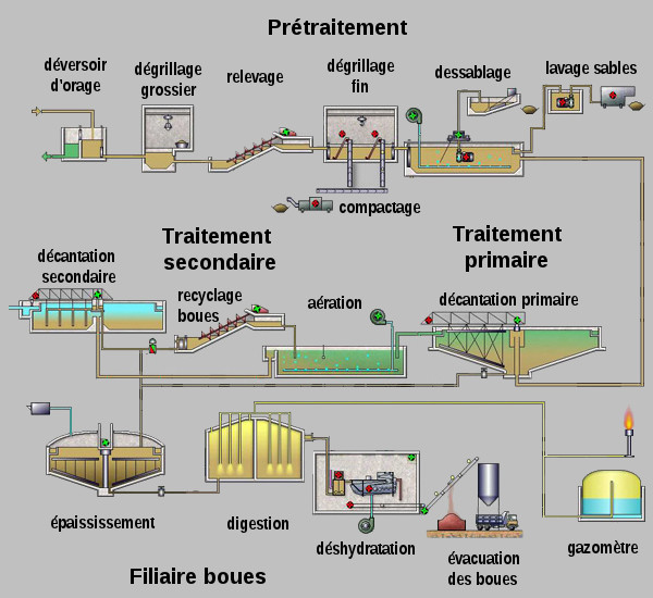 version francophone du schéma de fonctionnement d'une usine de dépollution